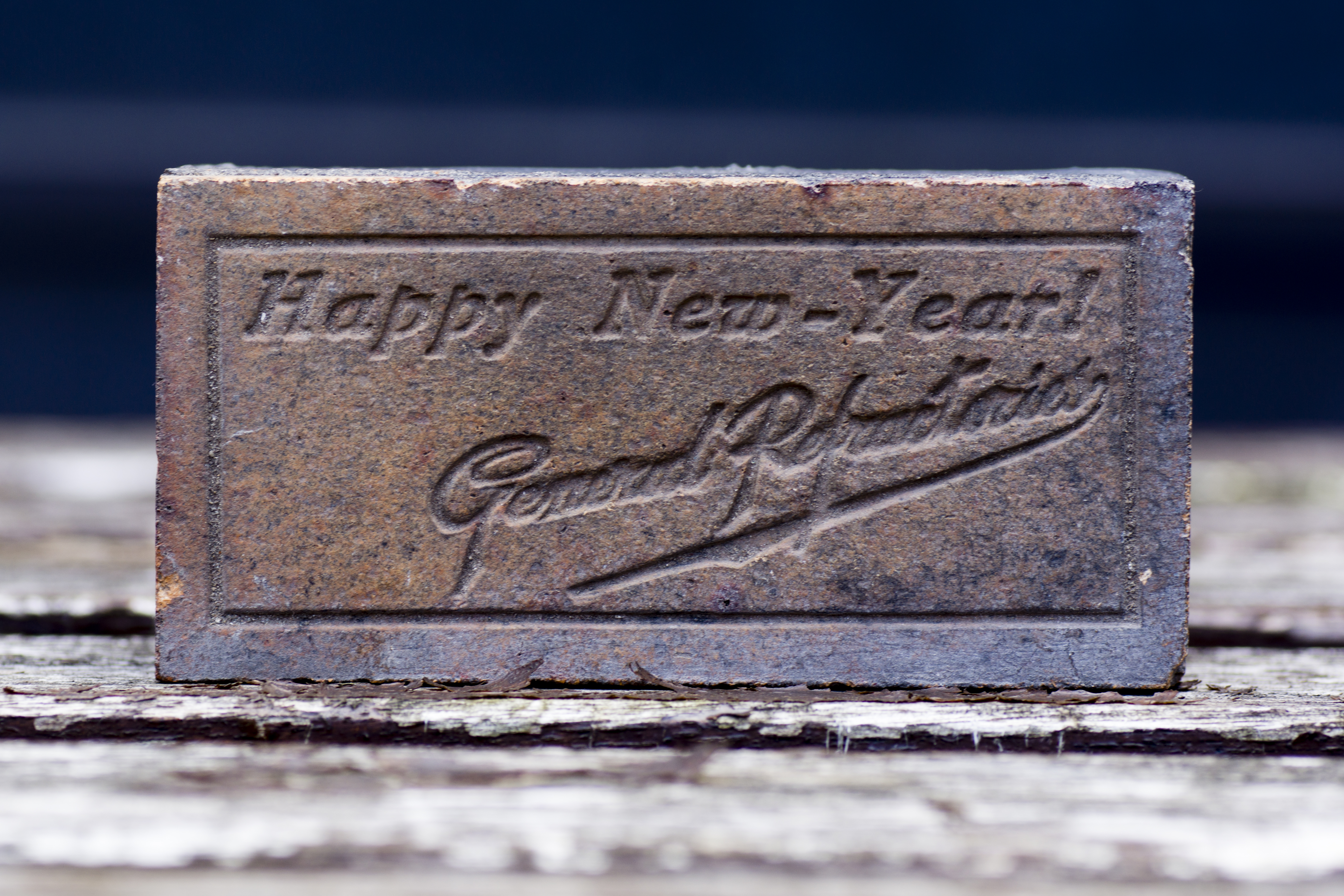 Cadeau d’entreprise « Happy New Year ! » Briquette réfractaire General Refractories Seilles, 1934-1968 Inv. MCA.4489 This is a file created at the museum: Ceramic Museum in Andenne